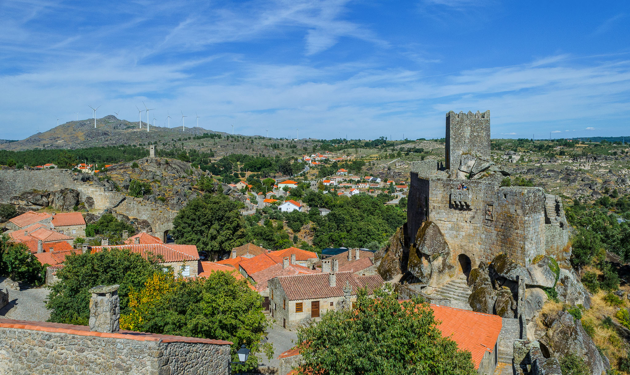 Sortelha